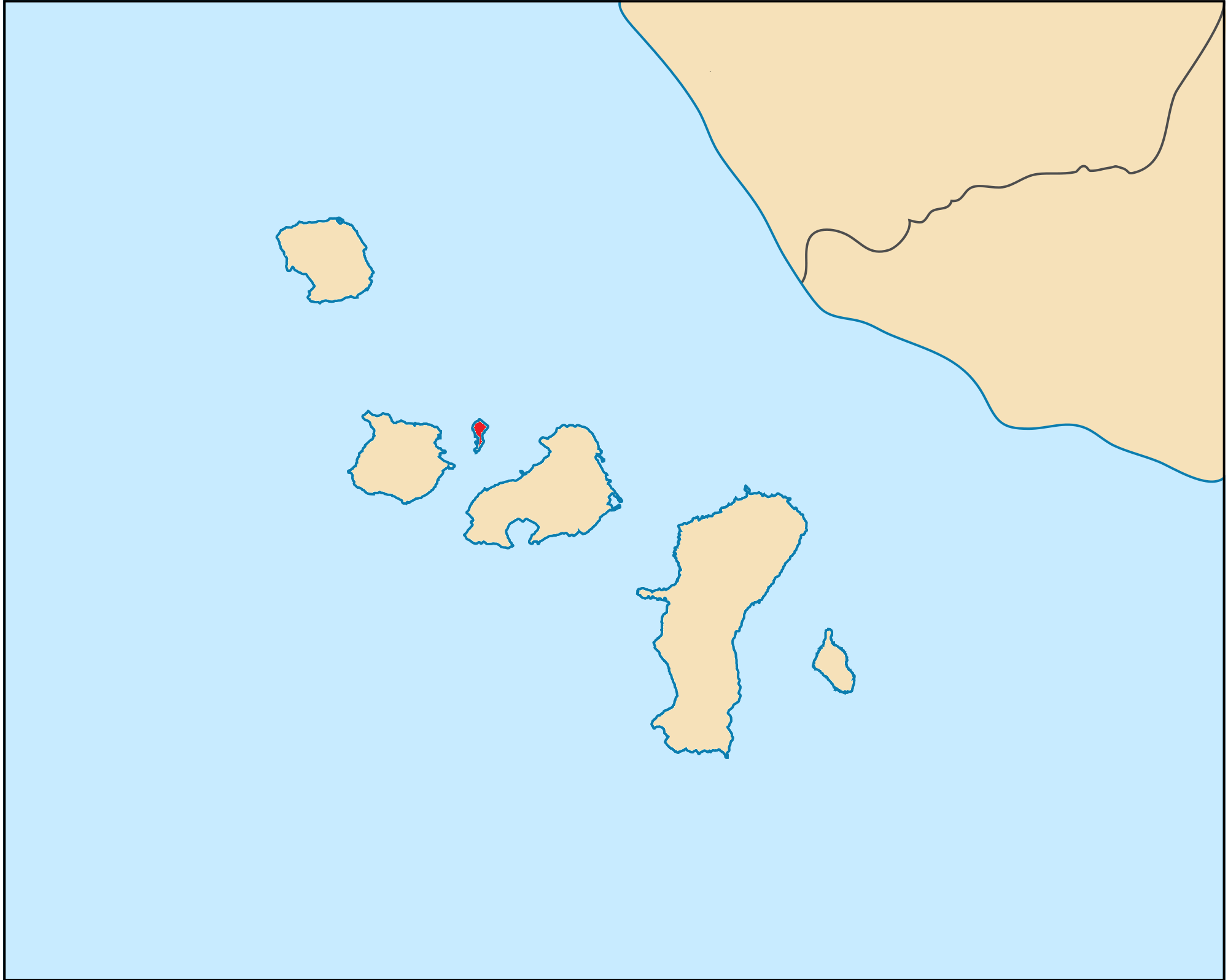 Kaşık Adası'nın konumu